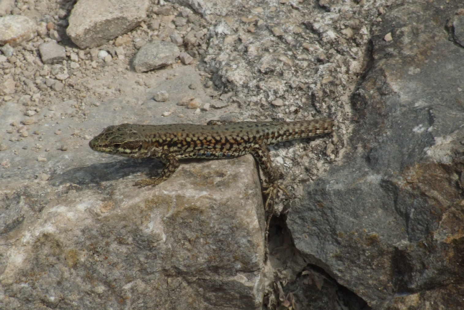 Lézard ayant perdu un morceau de queue, pris en Bourgogne, FRANCE